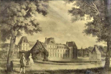 peinture du 19e siècle du château des Vaux au 18e avant les agrandissements du 19e